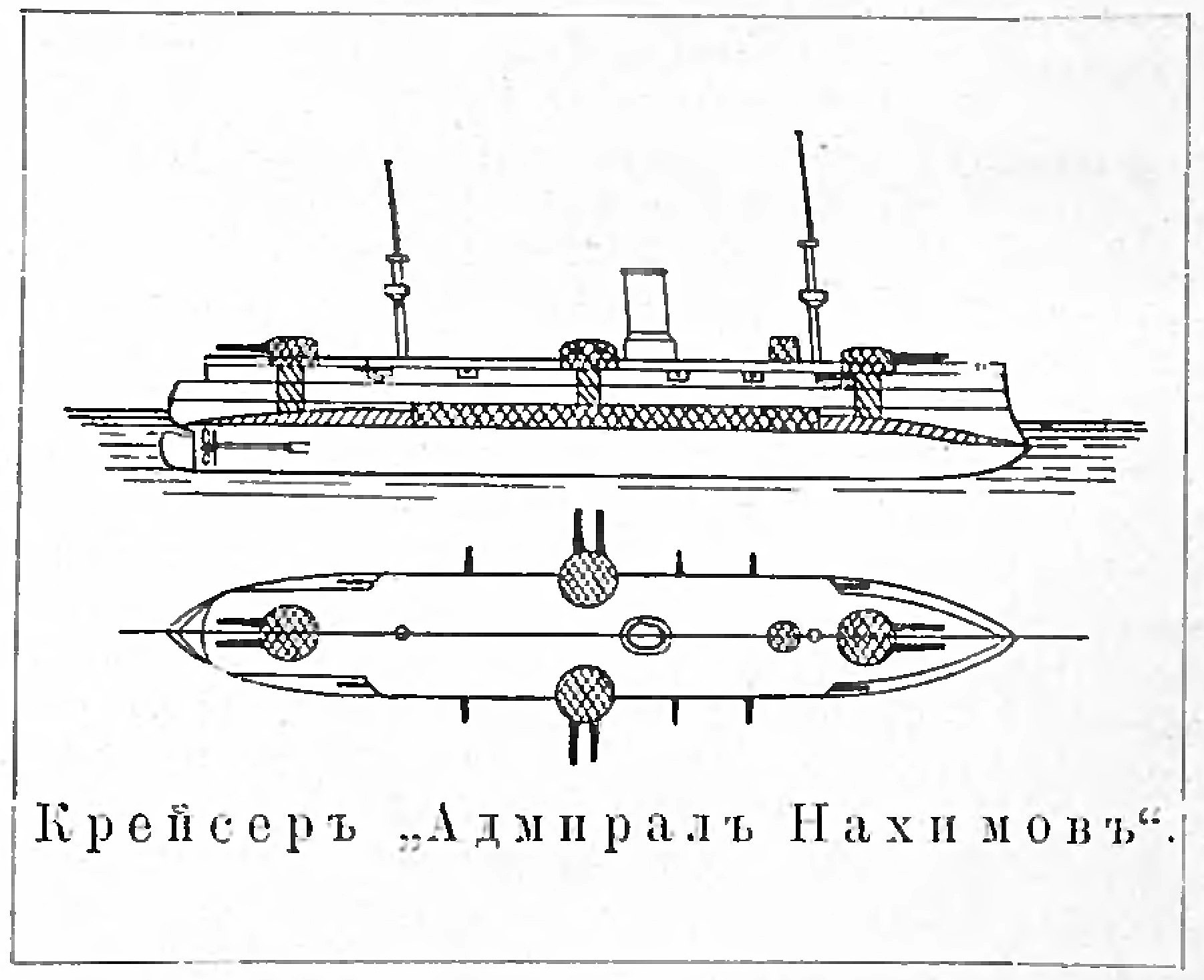 Изображение из «Военной энциклопедии» изданной книгоиздательским товариществом Ивана Дмитриевича Сытина. Санкт-Петербург; 1911—1915 гг. Фото к статье «Адмирал Нахимов».